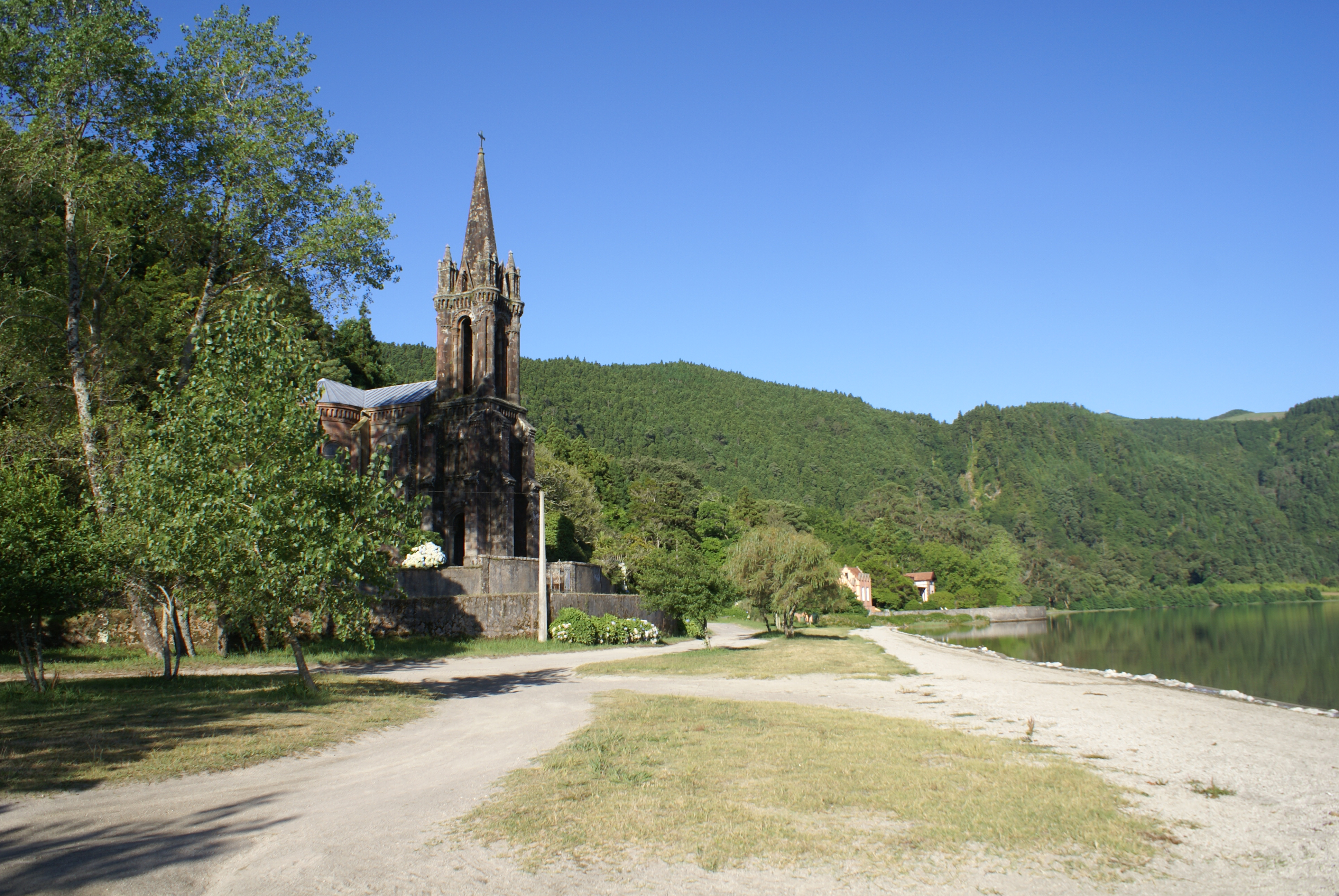 Capela de Nossa Senhora das Vitórias, (Ermida de José do Canto), Vista lateral, Lagoa das Furnas, ilha de São Miguel, Açores